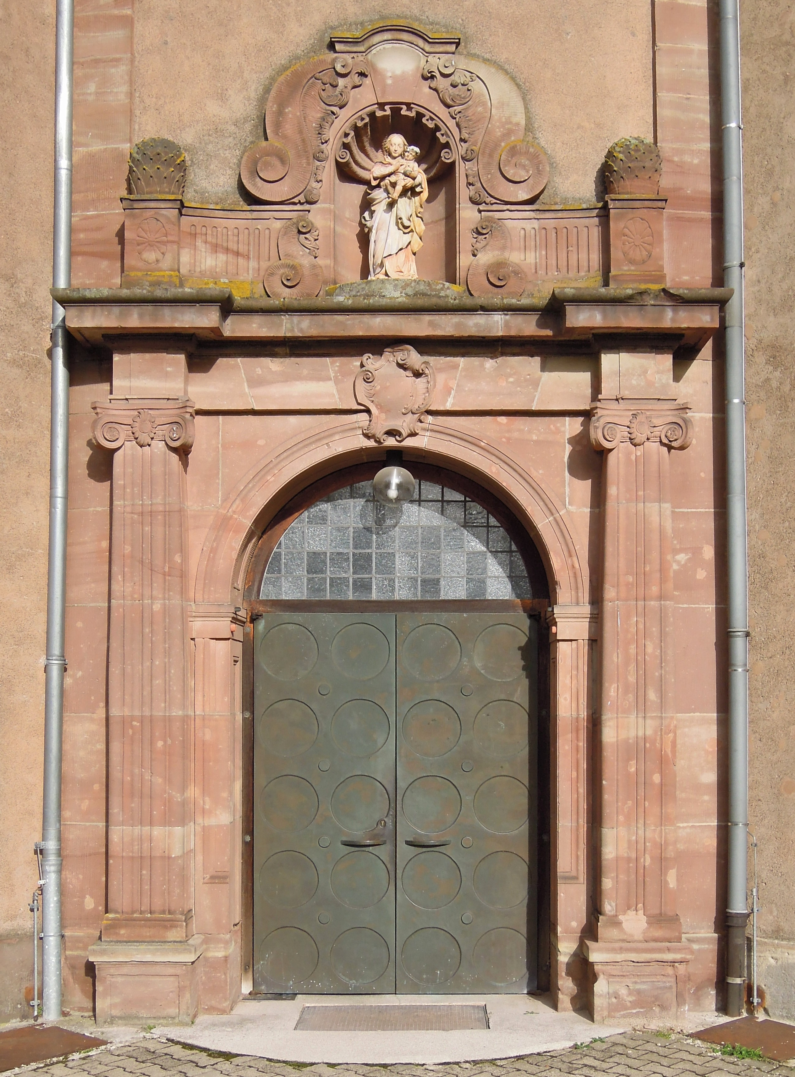 Dechantstraße, kath. Pfarrkirche St. Martin, 1758, 1912 Erweiterung von Peter Marx (Einzeldenkmal))